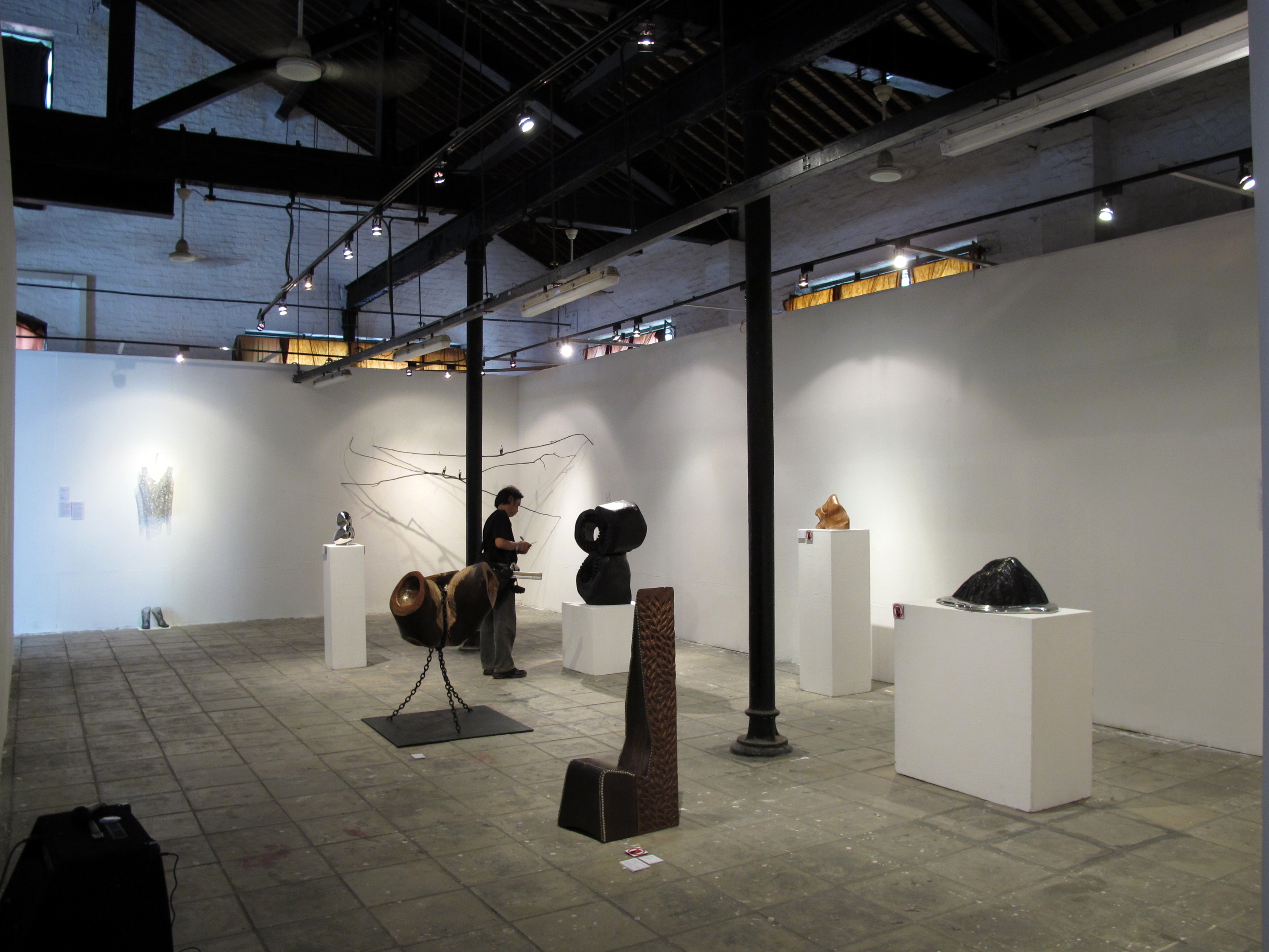 Cattle Depot Artist Village 牛棚藝術村